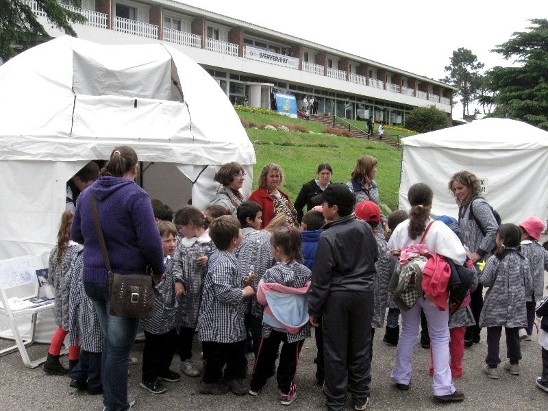 El OALM en la 26ª Feria Nacional de Clubes de Ciencia en el Parque de Vacaciones UTE-ANTEL, departamento de Lavalleja, Uruguay. 19 de octubre de 2012